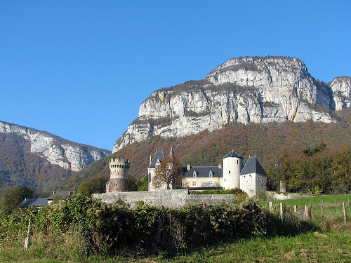 Château de La Bâtie-Seyssel en France dans le département de la Savoie.